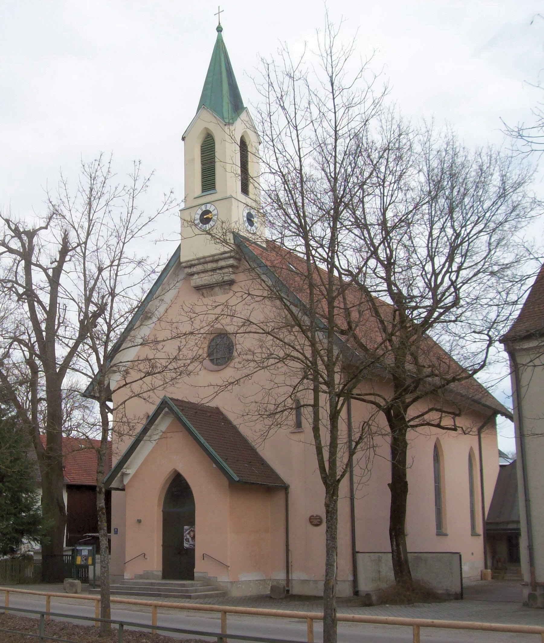 St.-Paulus-Kirche, München-Perlach, Sebastian-Bauer-Str. 21, Georg Friedrich Ziebland (1849). Gedenktafel: St.-Paulus-Kirche / ältestes noch erhaltenes / protestantisches Gotteshaus / Münchens / erbaut 1849 durch / Georg Friedrich Ziebland